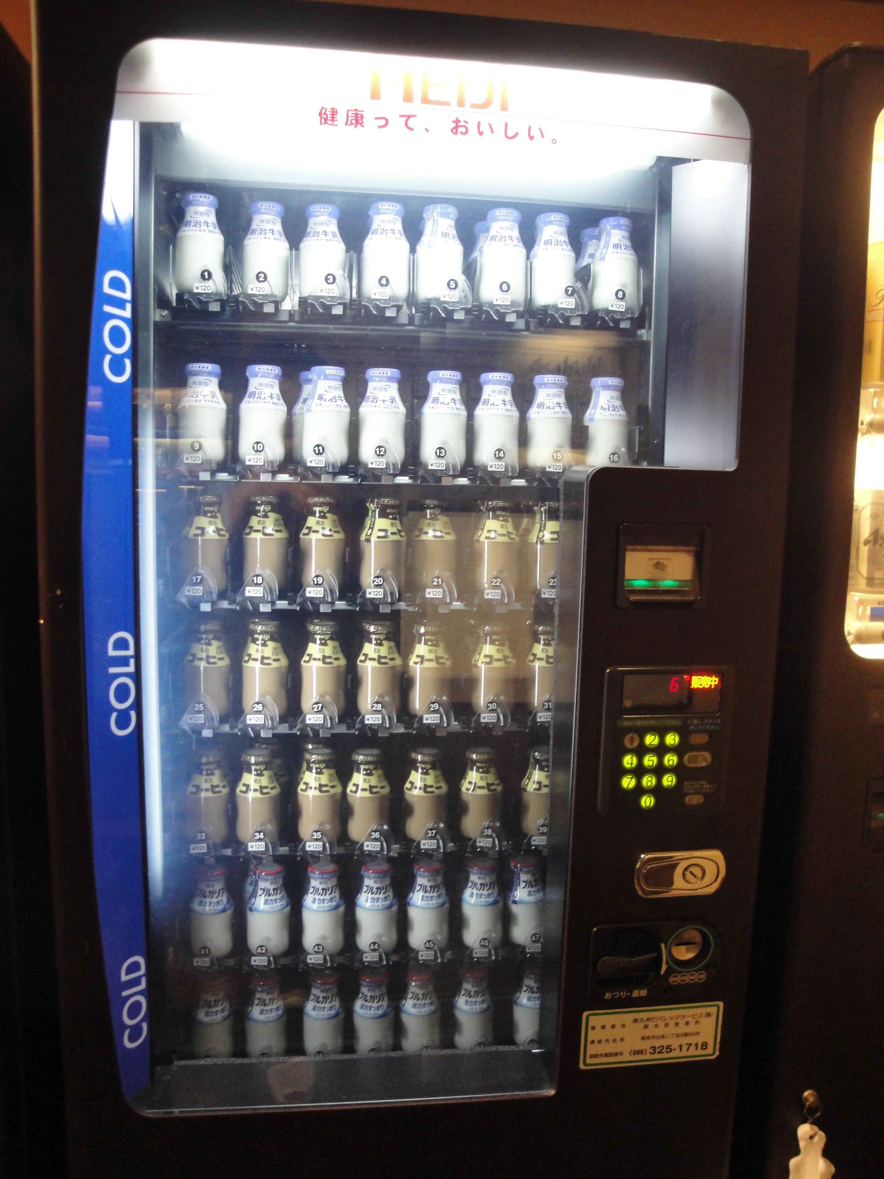 六花の湯 ドーミーイン熊本